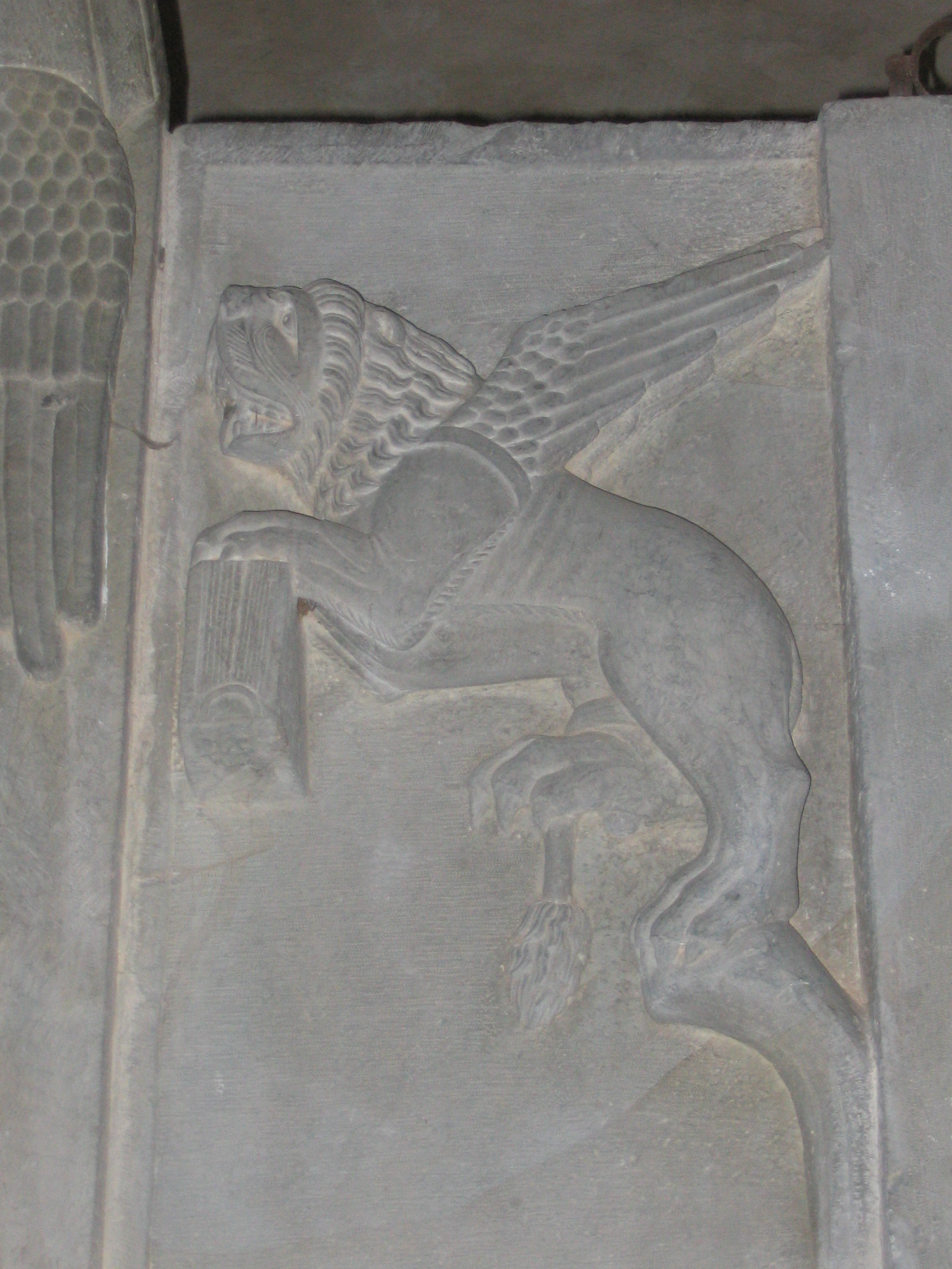 Autore Giorces. Almenno San Salvatore, la Pieve, ambone particolare.